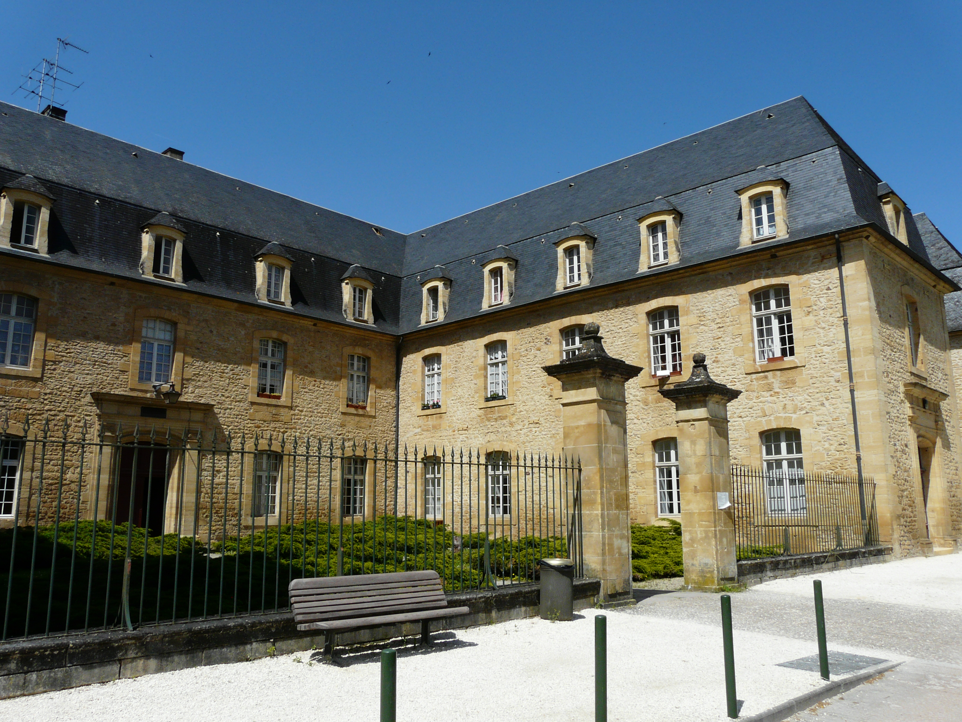 L'hôpital général de Sarlat, Sarlat-la-Canéda, Dordogne, France.